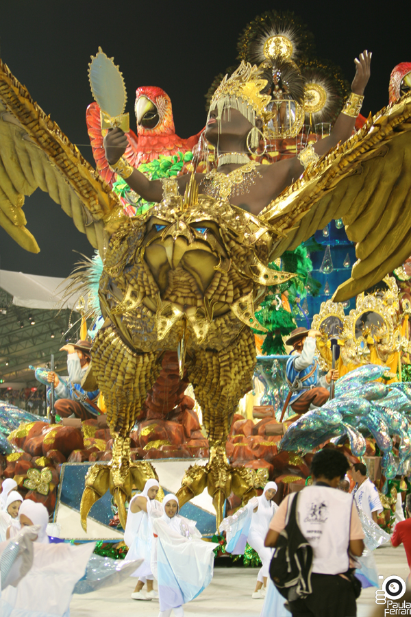 Carnaval 2010. São Paulo. Sambódromo. Sábado, 13 de fevereiro